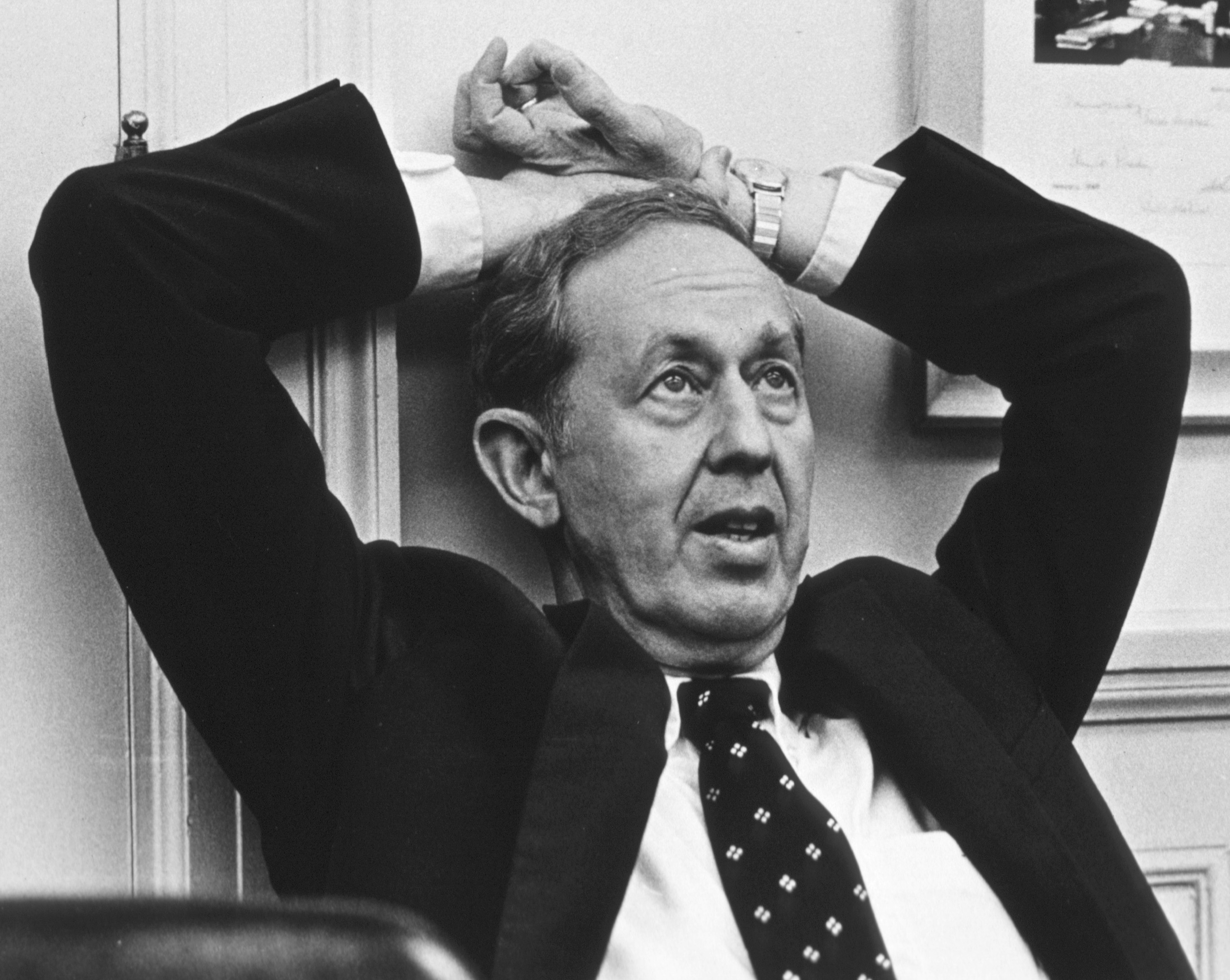 Robert Stone